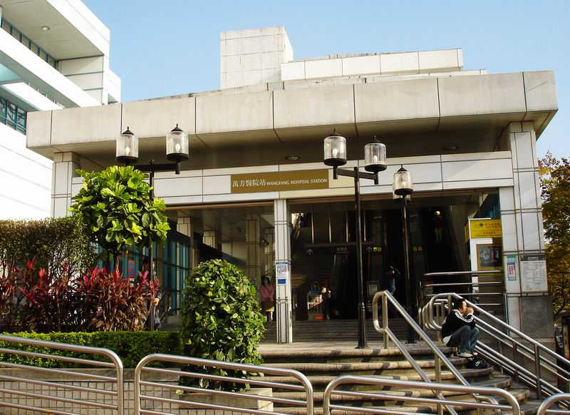 臺北捷運文山線萬芳醫院站出口外觀。